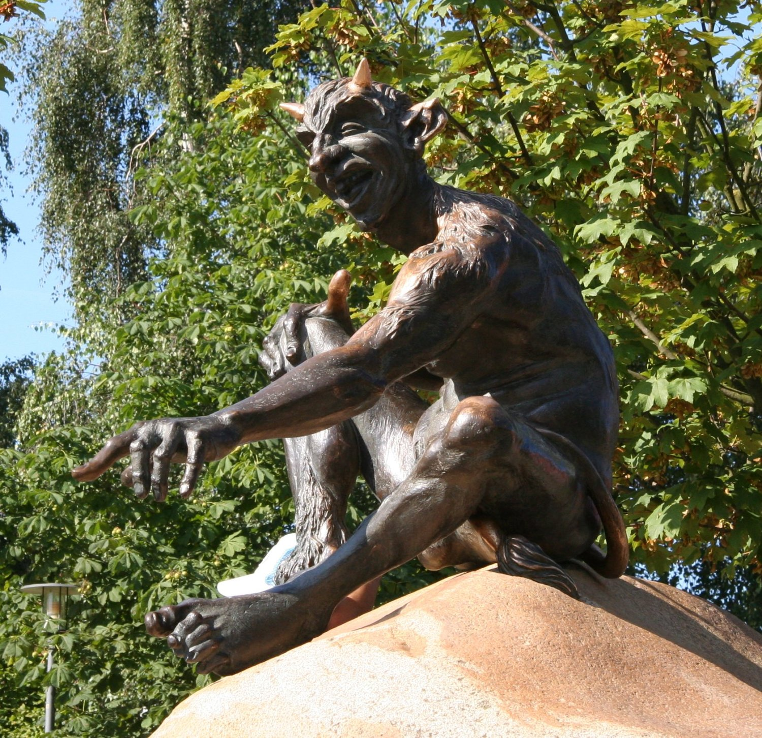 Figur auf dem Hexentanzplatz Thale (Germany)